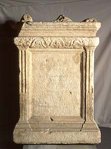 Ara dedicata a Roma il 19 luglio 374 a Cibele e ad Attis, marmo, Musei Vaticani